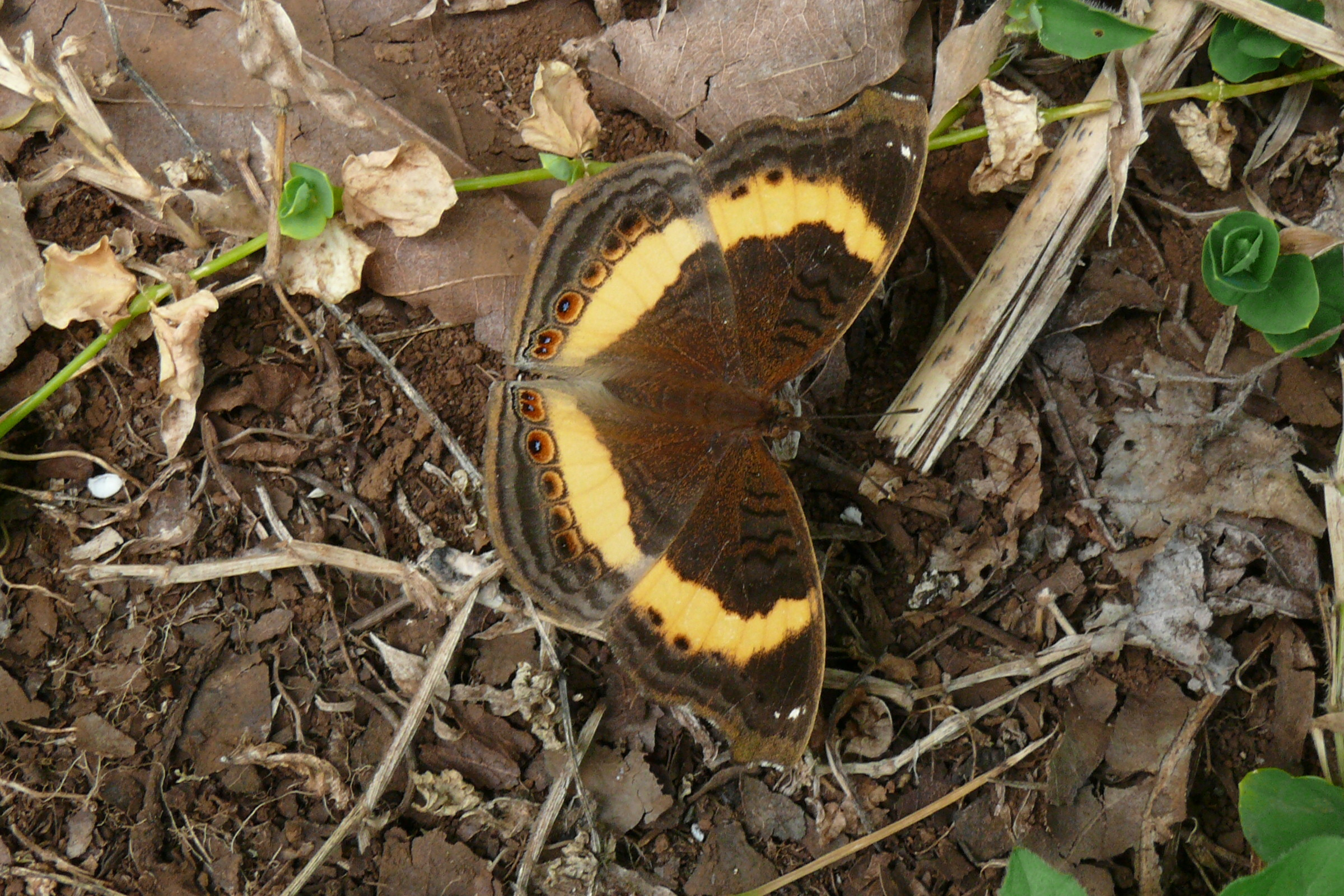 Junonia terea fotografiert in Nordtansania